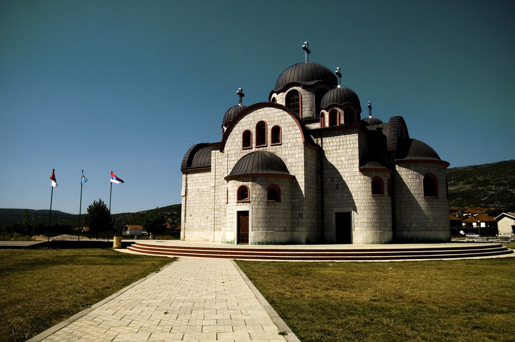 Crkva u Ljubinju